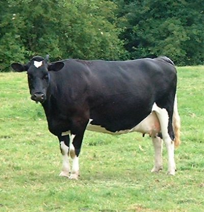 vache Prim'Holstein au pâturage (Oise, France)